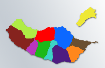 Imagem vectorial da Ilha da Madeira assinalando a sua divisão administrativa